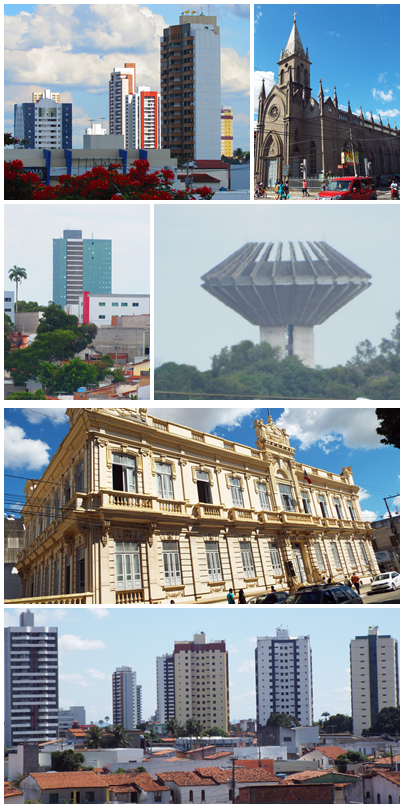 Mosaico de fotos de Feira de Santana: Santa Mônica, Senhor dos Passos, Centro, Tomba, Prefeitura e Ponto Central.